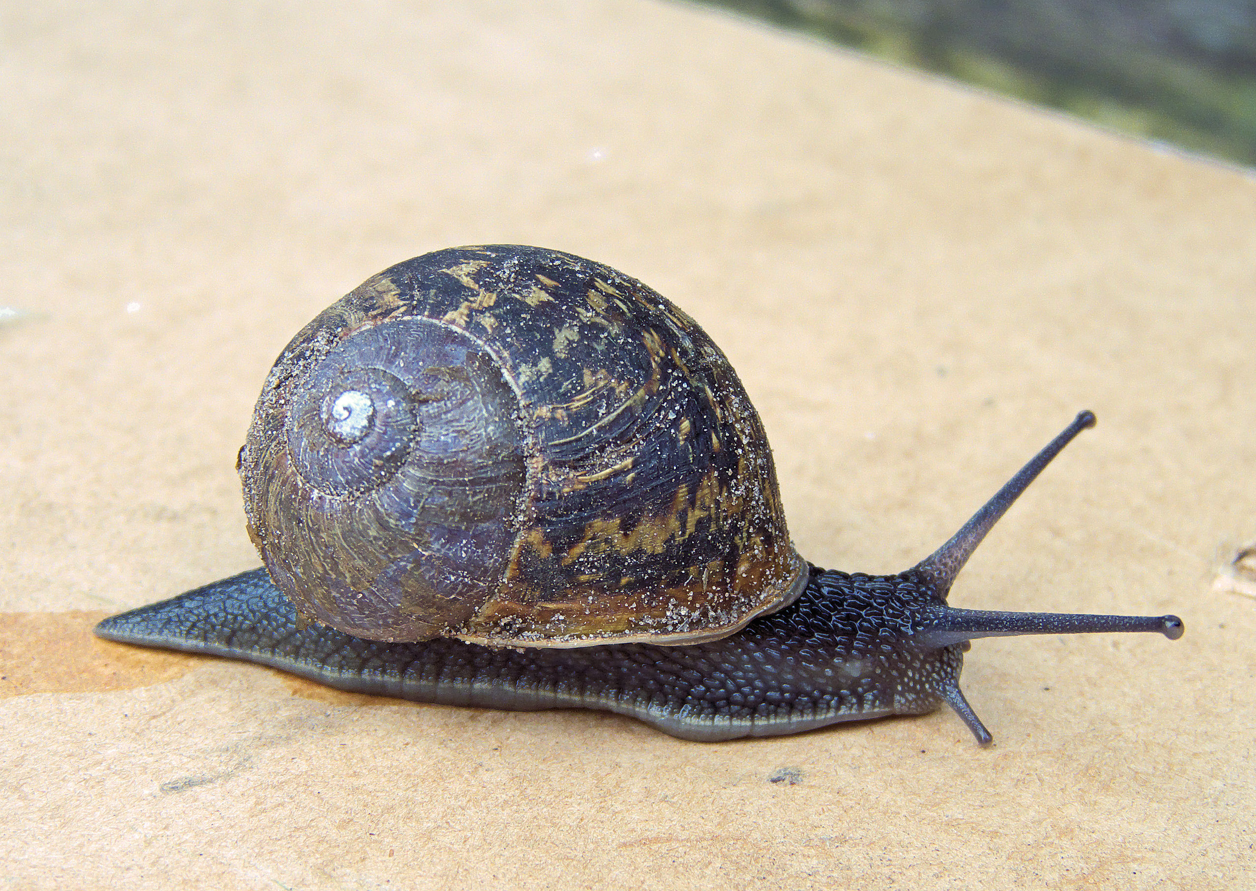 Cornu aspersum; Segrijnslak